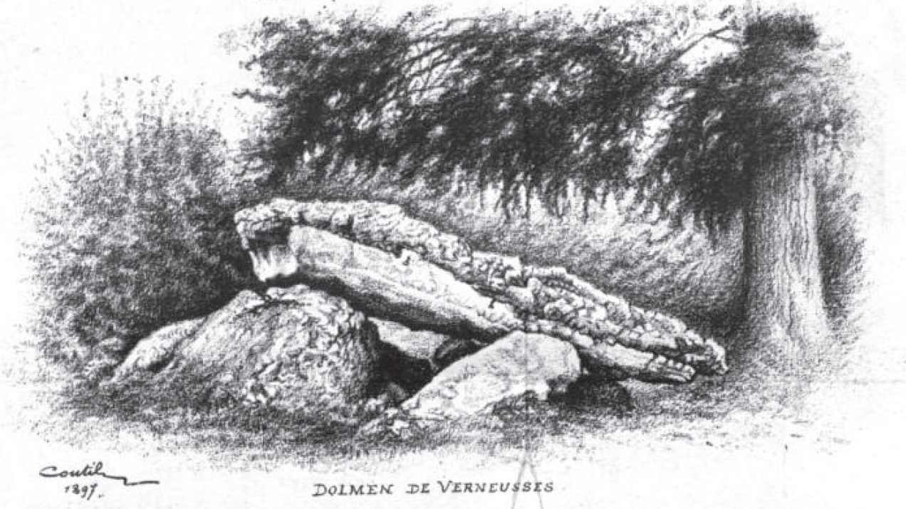 Dessin du dolmen de Verneusses réalisé par Léon Coutil en 1897